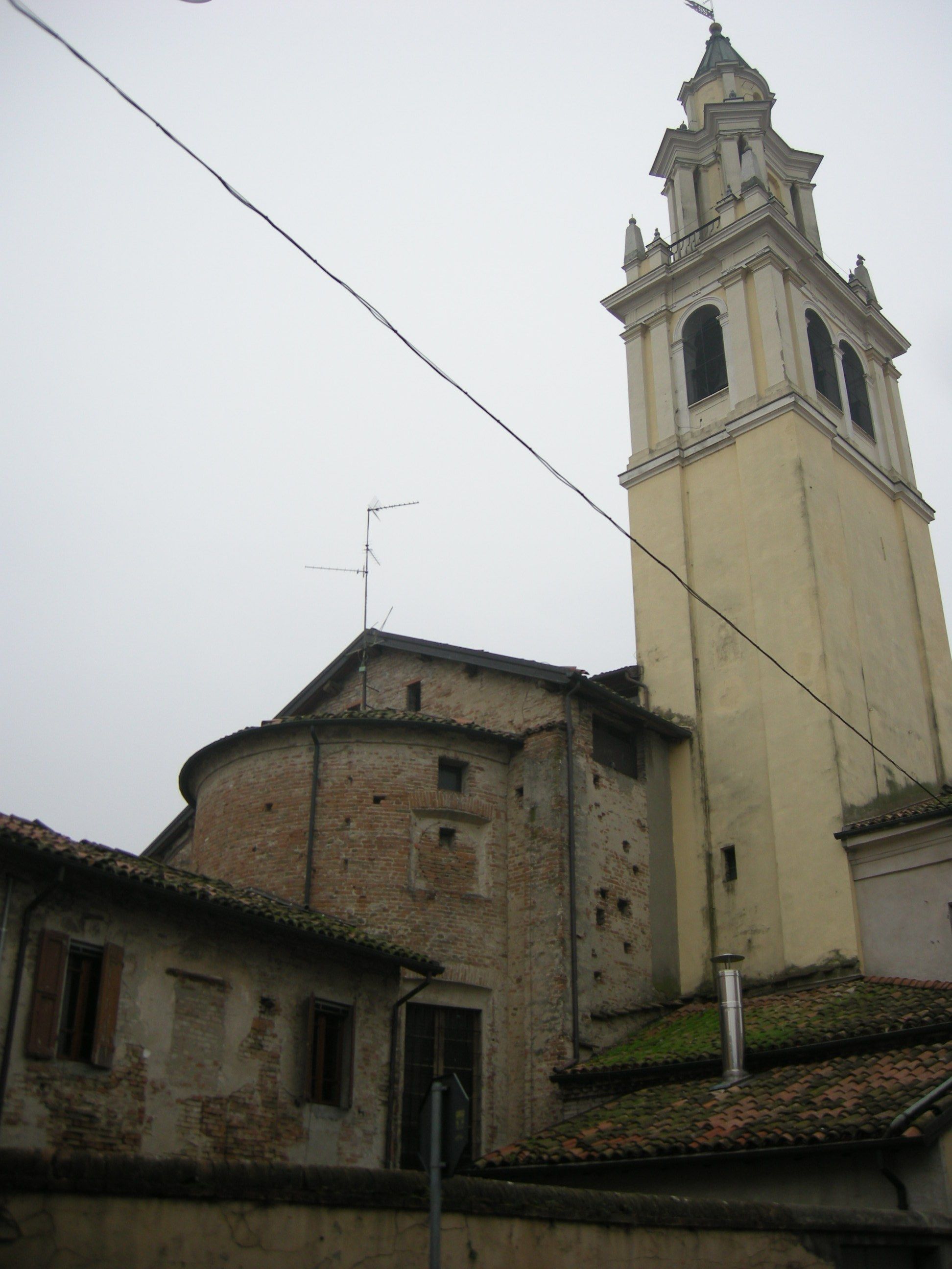 San secondo parmense, duomo